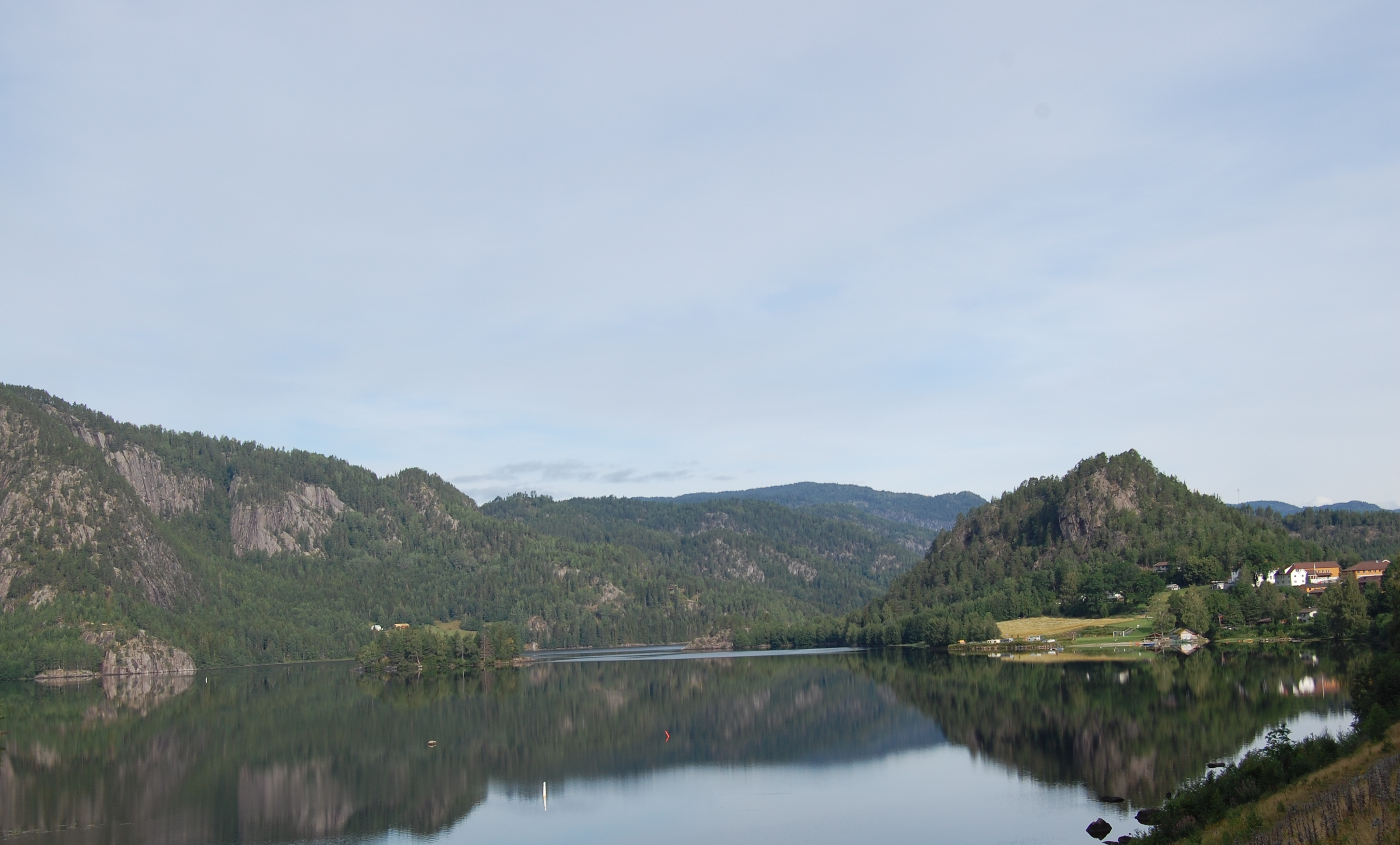 Kviteseidvatnet